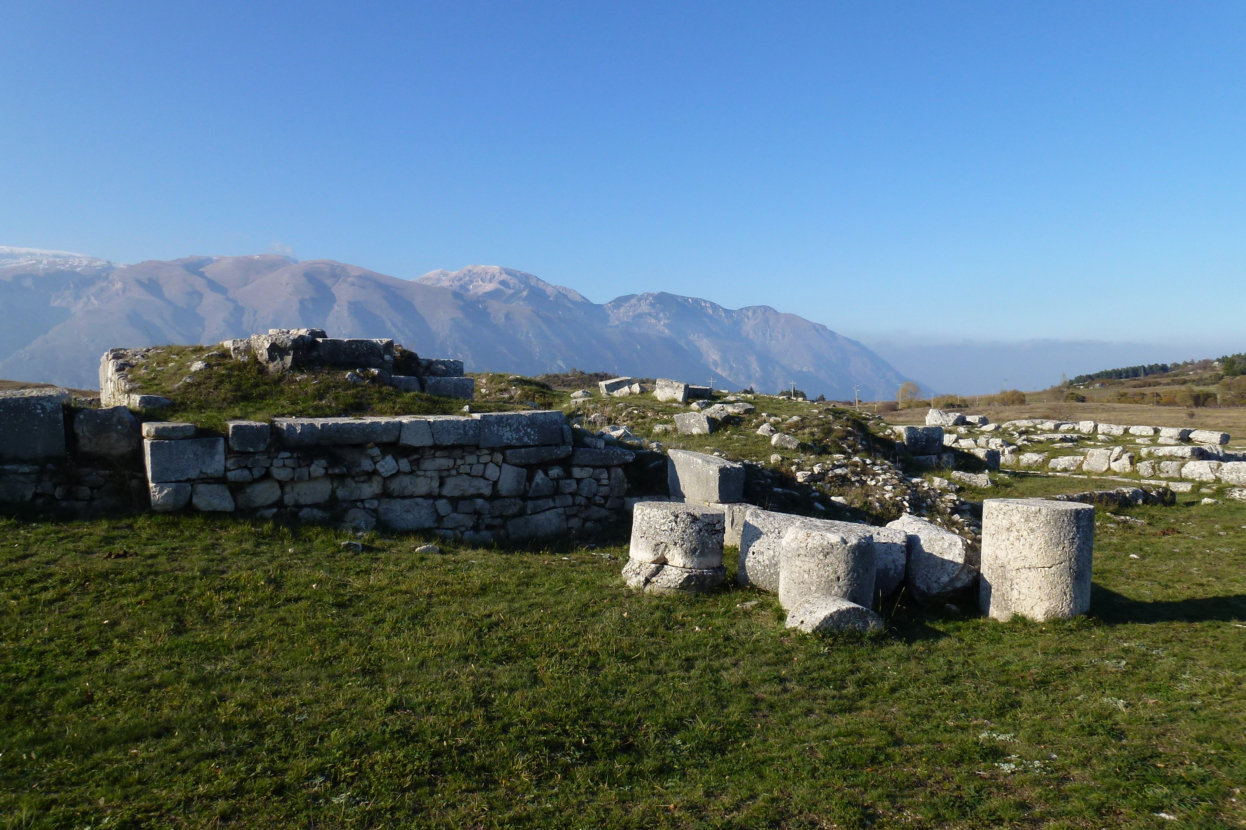 Juvanum-I resti sulla collina del'acropoli